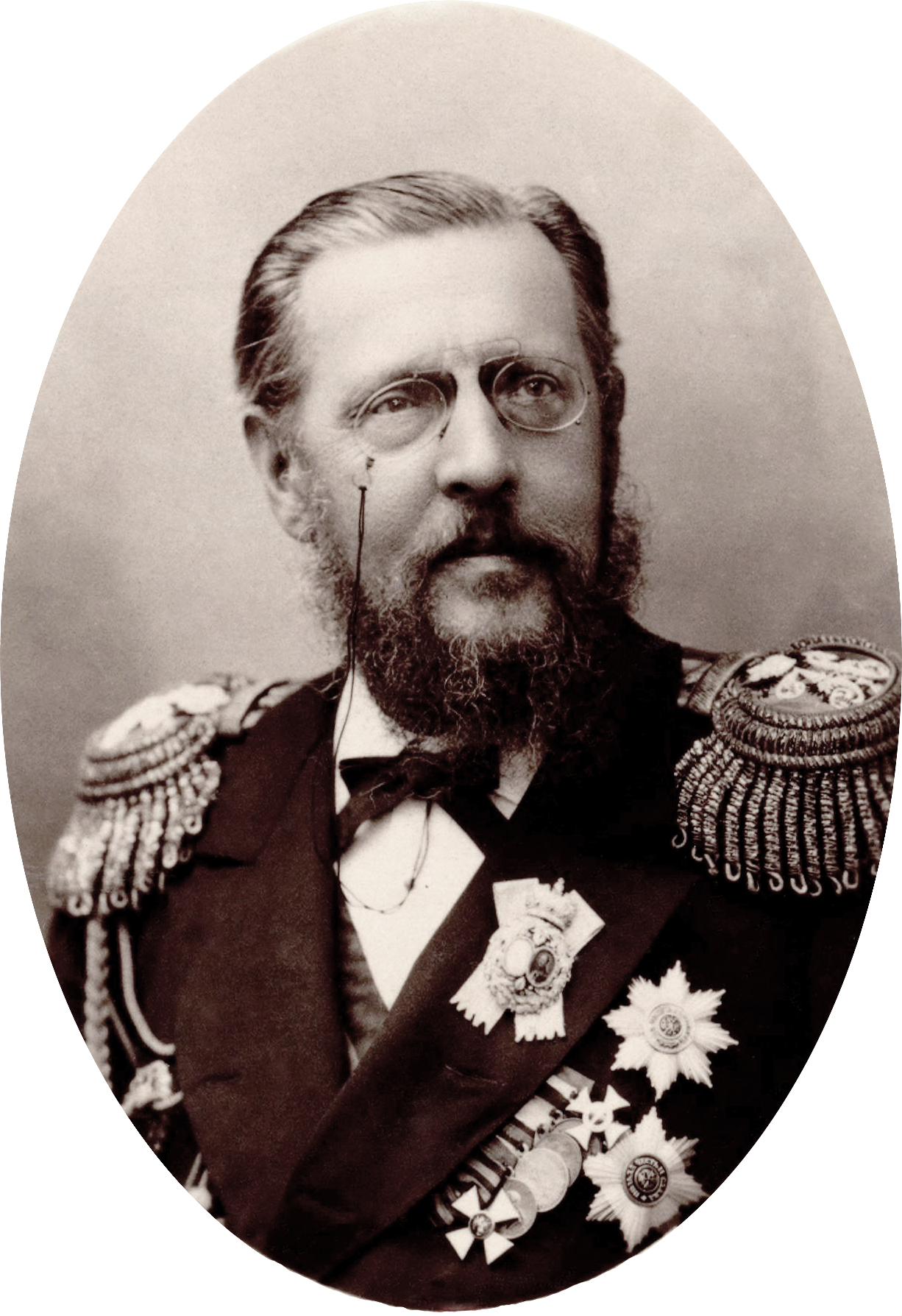 Grand-Duc Constantin Nikolaïevitch de Russie, (1827 - 1892), amiral de la flotte, fils cadet du tsar Nicolas 1er et frère du tsar Alexandre II